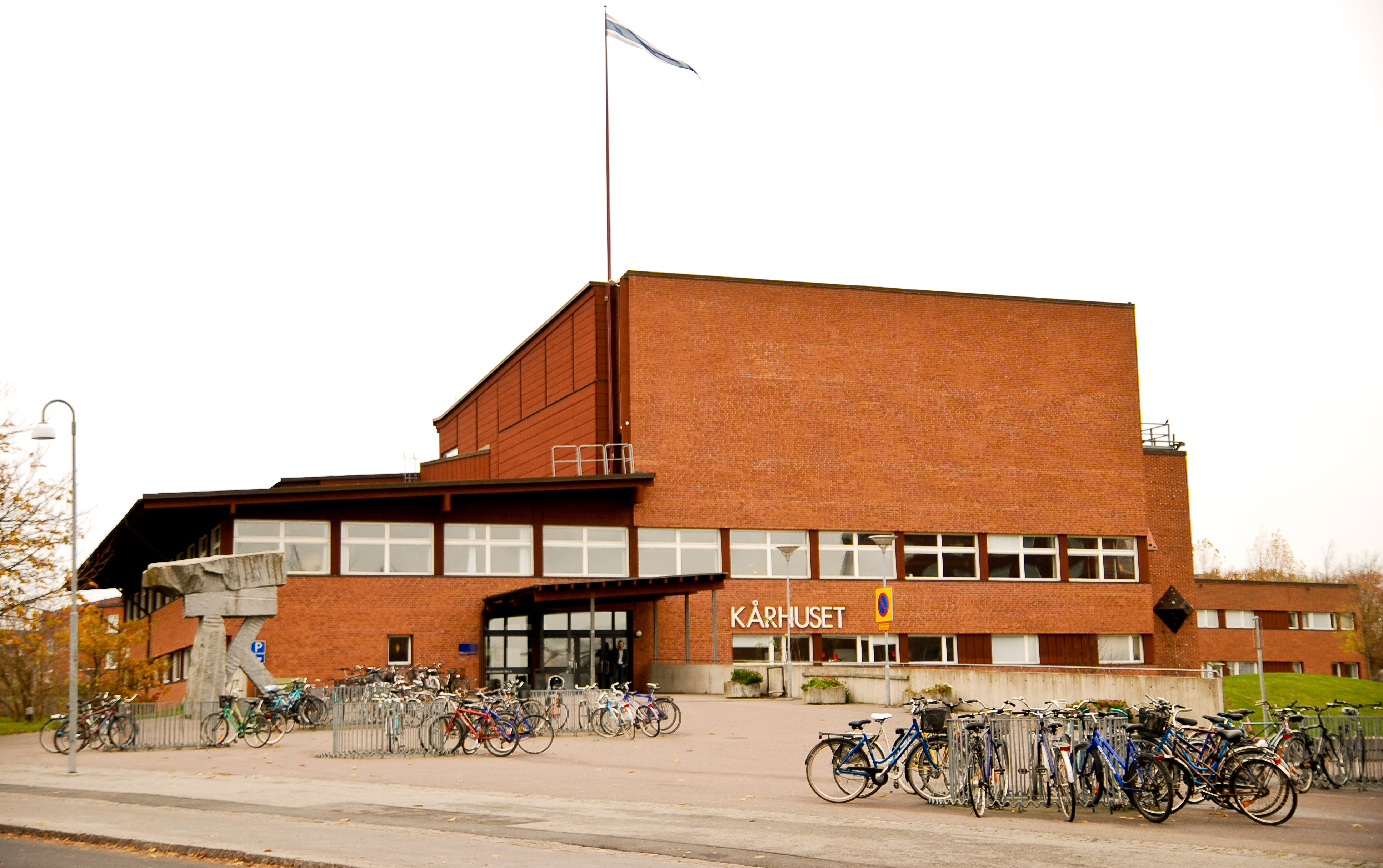 Kårhuset, LTH, Lund